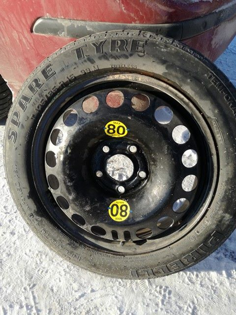 Tagavararatas